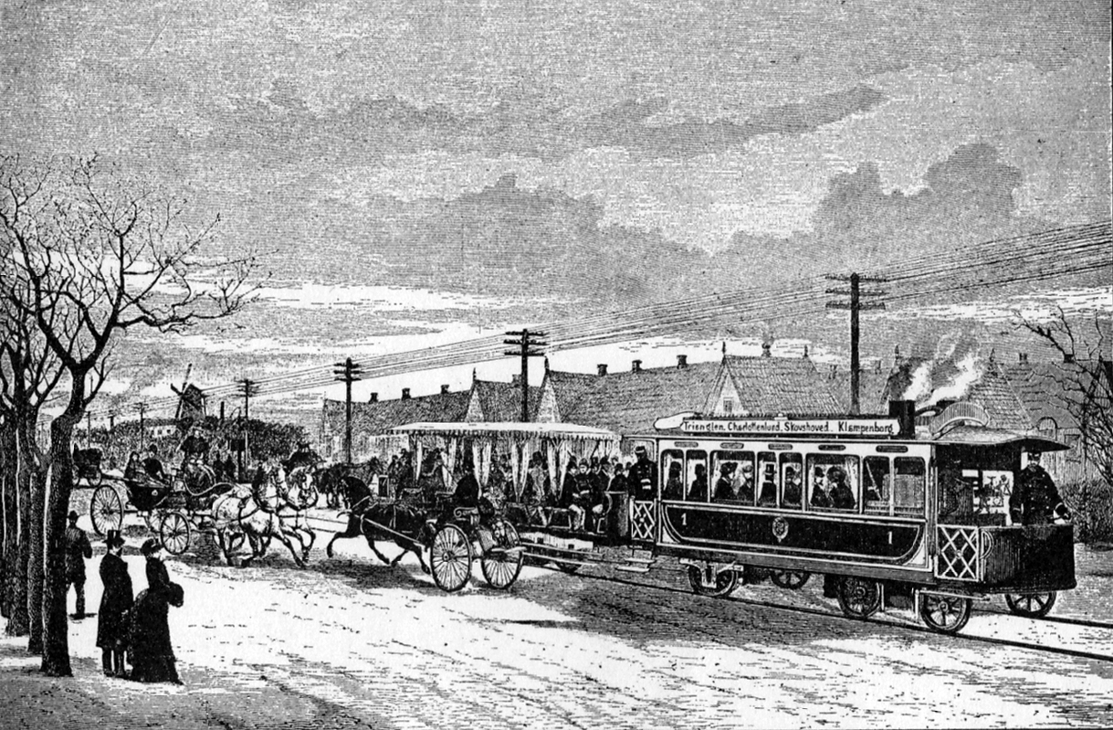 Strandvejens Dampsporvej var en sporvognslinje der blev anlagt i 1883 fra Tuborg Bryggerierne i Hellerup til Jægersborg Dyrehave.